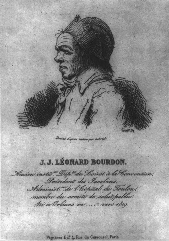 Léonard Bourdon. Gravure publiée par Jean-Eugène Vignères (1812-1884) entre 1842 et 1846, d'après le croquis dessiné par Georges-François-Marie Gabriel en 1794.